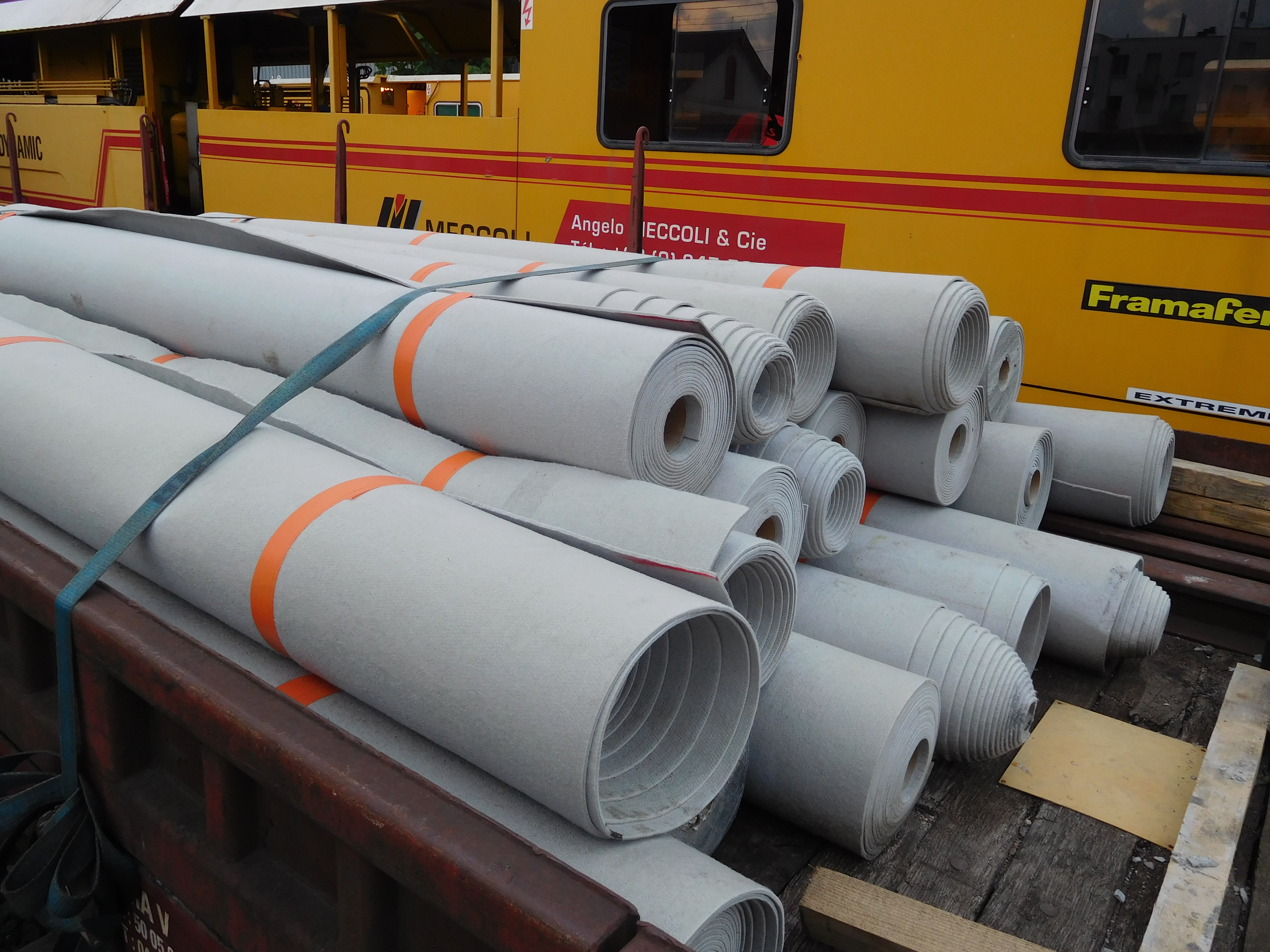 Rouleaux de géotextile anti-végétation pour voie ferrée, sur wagon plat relié à une dégarnisseuse-cribleuse Plasser & Theurer RM 900 SF, en gare de Cosne-sur-Loire (Nièvre, France). Les rouleaux seront déroulés sur la terre, juste après la chaîne de la dégarnisseuse. Le géotextile empêche la végétation de pousser.